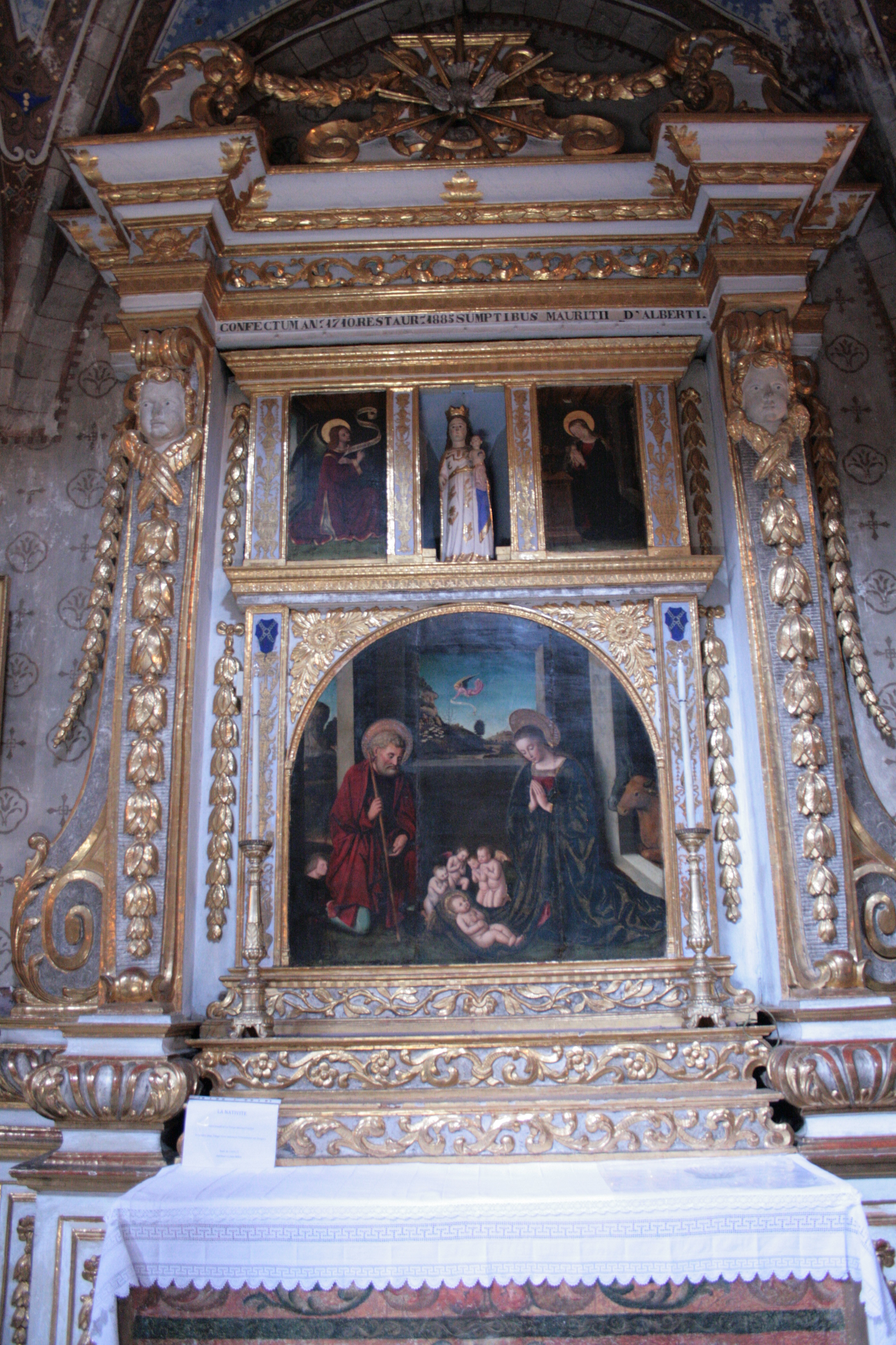 La Brigue (Alpes-Maritimes, France), collégiale St-Martin, retable de la Nativité, attribué à Louis Bréa (1514?); la fiche de la base Palissy lui donne par erreur le titre d'Annonciation, effectivement représentée au registre supérieur.